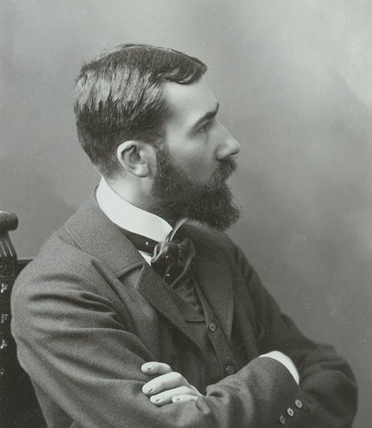 Antonín Pech, český filmový režisér, kameraman a producent